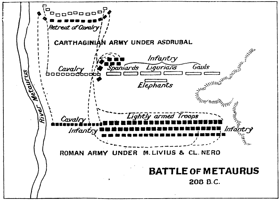 La Batalla de Metauro. .